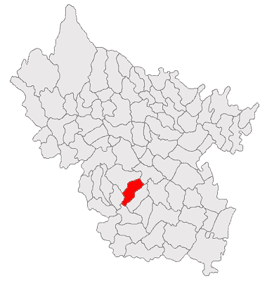 Categorie:Hărţi ale judeţului Buzău